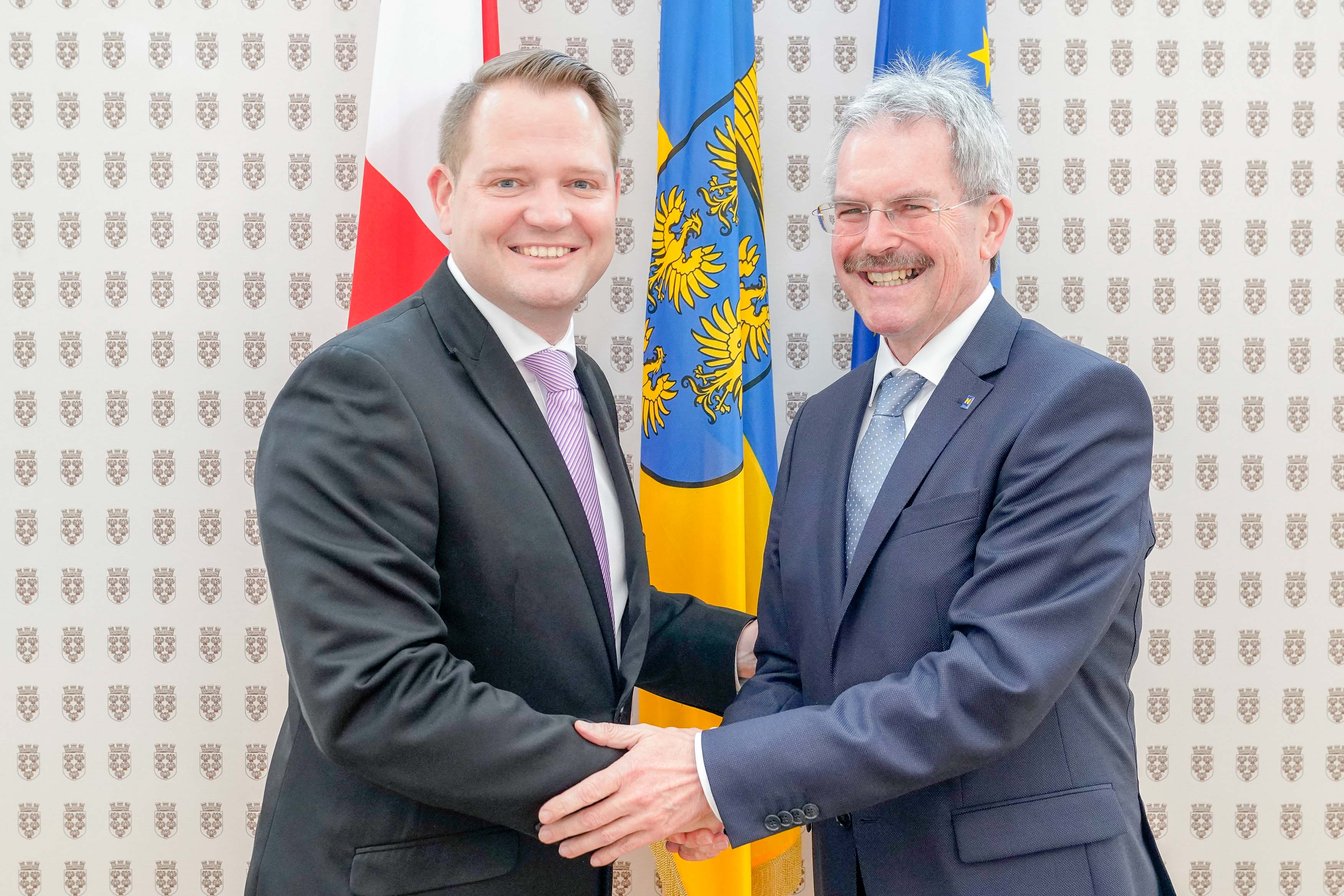 Landtagspräsident Karl Wilfing führt die Konstituierung der Landtags-Ausschüsse durch. Am Foto: Präsident Wilfing gratuliert LAbg Christian Samwald zur Wahl als Obmann des Bau-Ausschusses